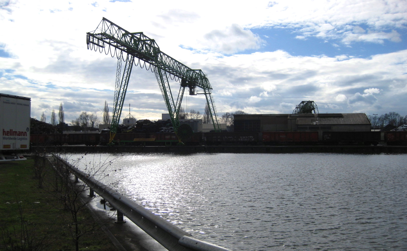 Hafen der Stadt Osnabrück, Stadtteil Osnabrück-Hafen